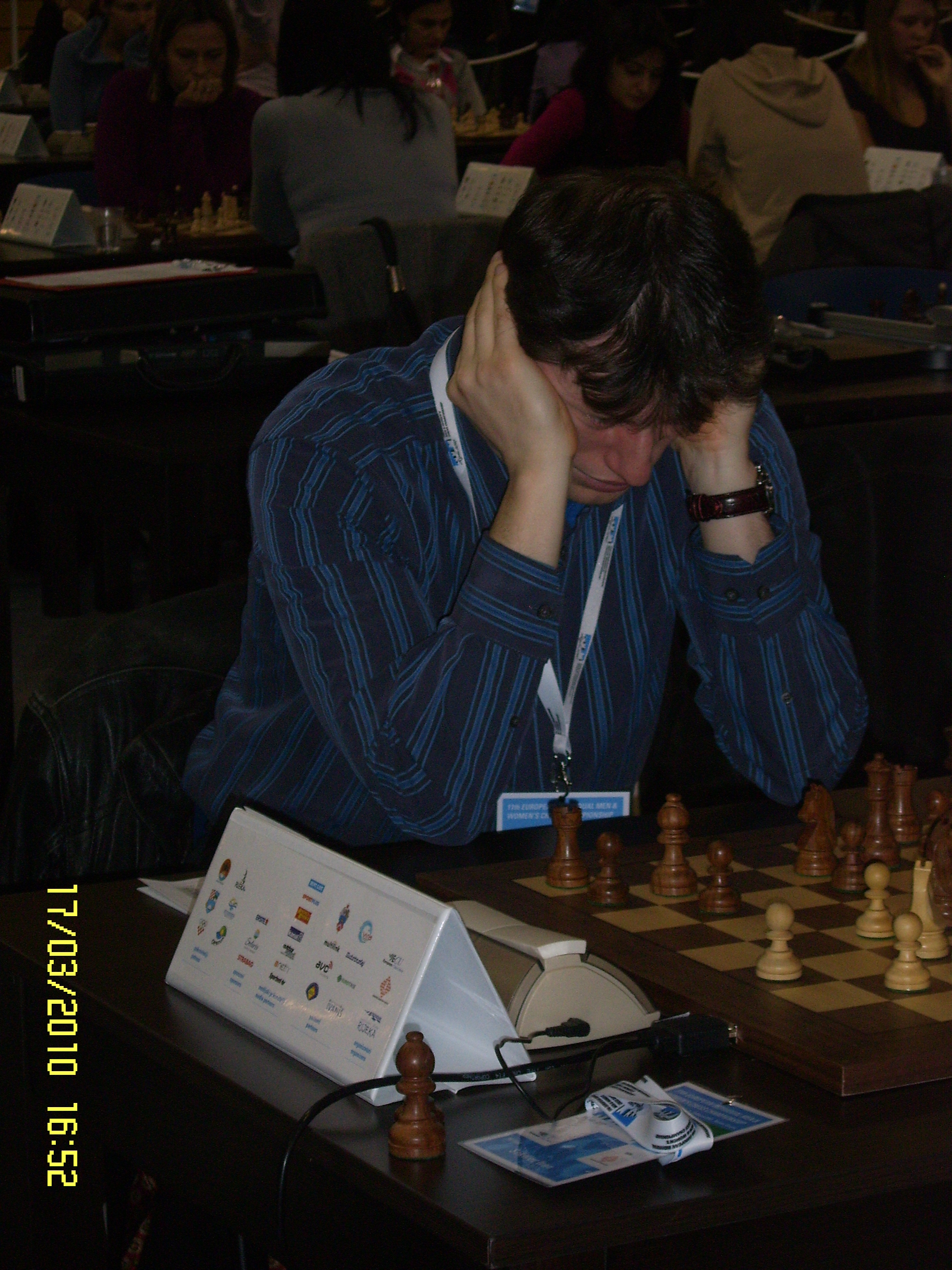 Mađarski velemajstor Zoltan Almasi na 11. Europskom pojedinačnom prvenstvu u šahu za muškarce i žene 2010. g. u Rijeci